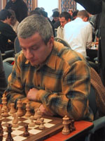 Kiril Georgiev.